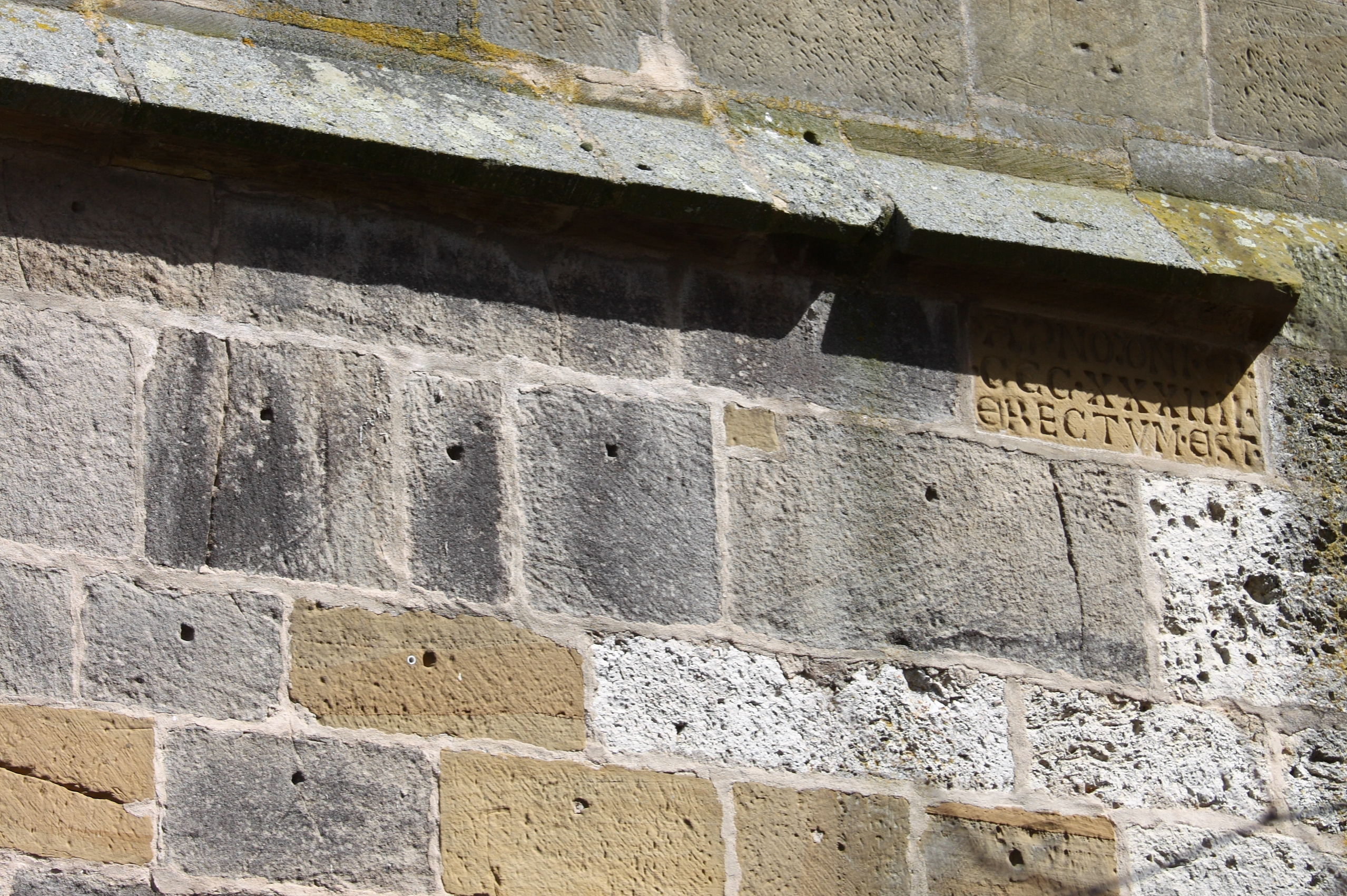 Evangelische Pfarrkirche, ehemalige Benediktinerklosterkirche St. Maria in Auhausen im Landkreis Donau-Ries (Bayern), an der Westfassade des Südturmes Stein mit Inschrift „ANNO DNI MCCCXXXIIII ERECTUM EST“ (er wurde im Jahr 1334 errichtet)